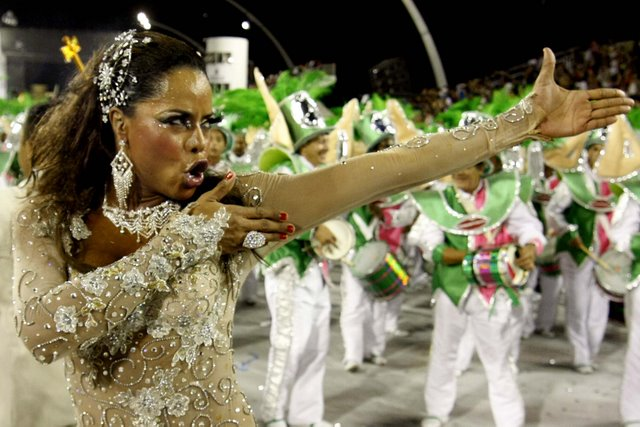 Adriana Bombom no Carnaval de 2010 em São Paulo.